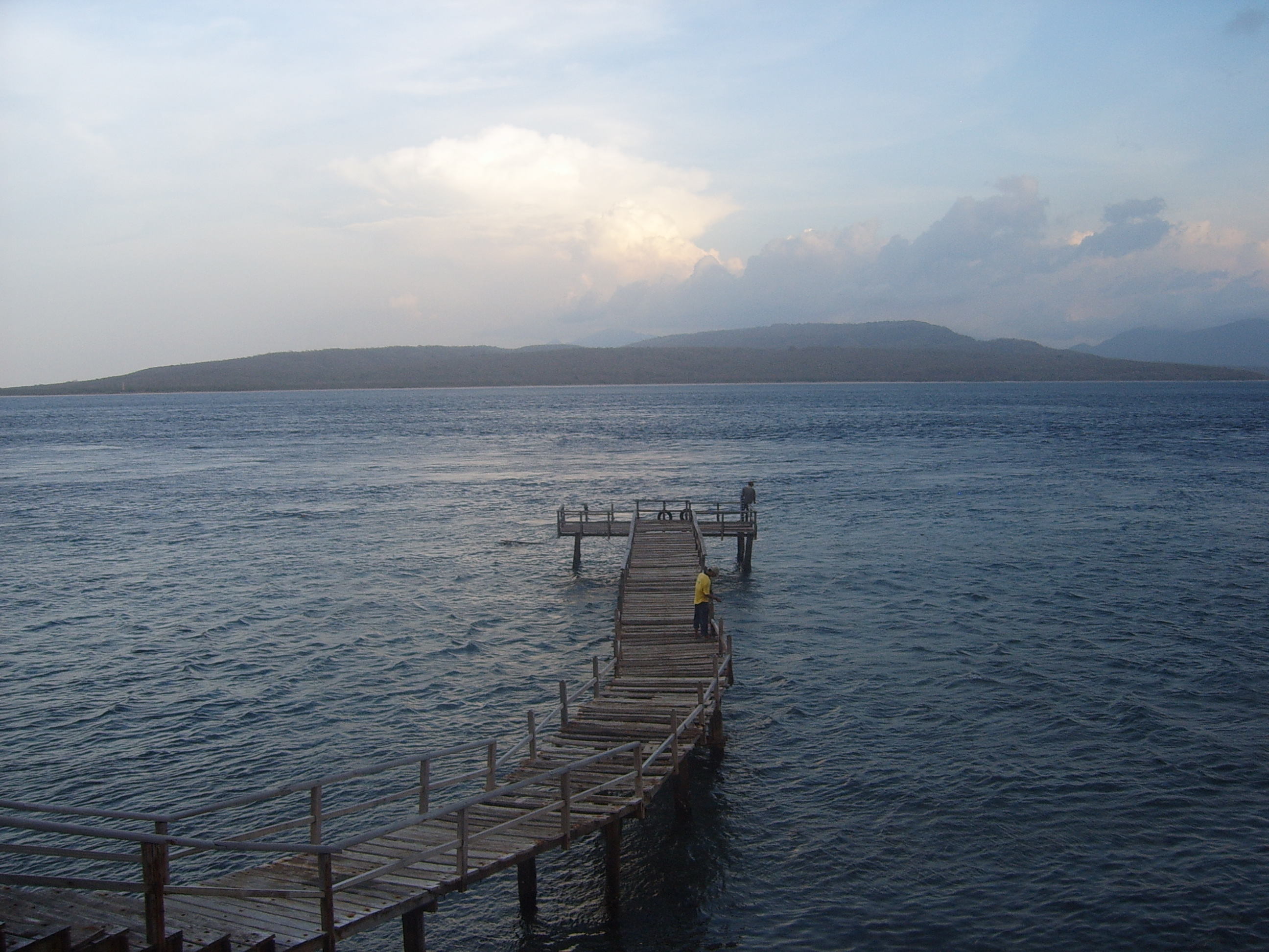 Bali strait